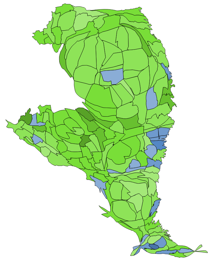 顏色對照表